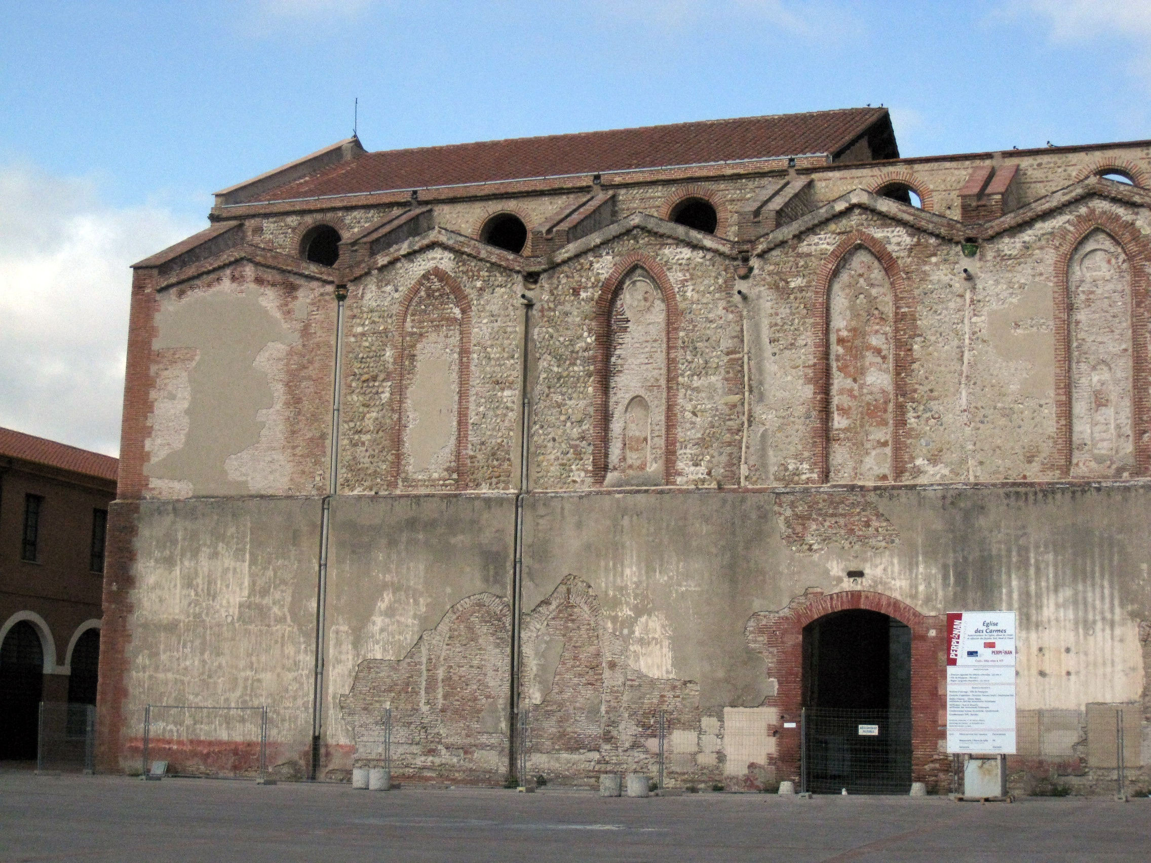 Església del Carme (Perpinyà), vista des de l'Arsenal, al lloc que ocupava l'antic claustre .